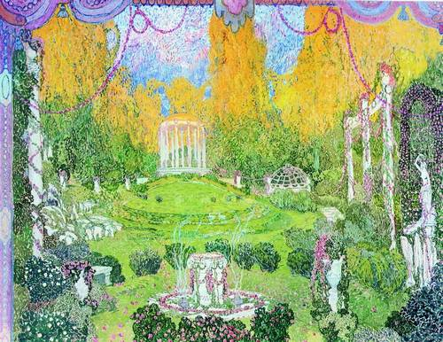 Храм Эроса. 1911 Эскиз декорации к опере К.В. Глюка "Орфей и Эвридика" Государственный центральный театральный музей им. А.А.Бахрушина